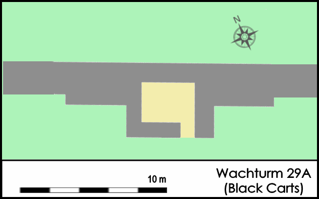 Befundskizze des Wachturms 29A (Black Carts), 2. Jahrhundert n.Chr., Hadrianswall (GB).